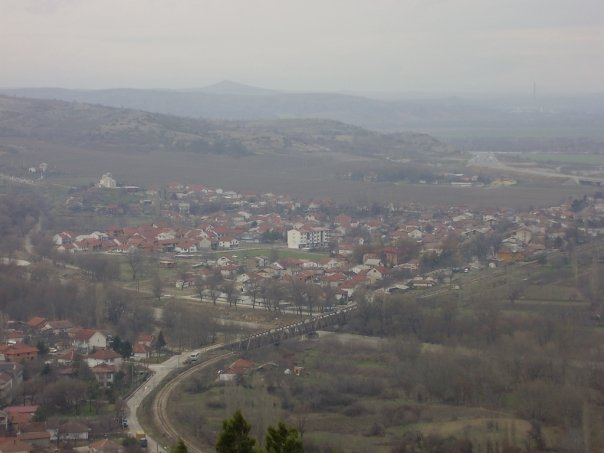 Демир Капија